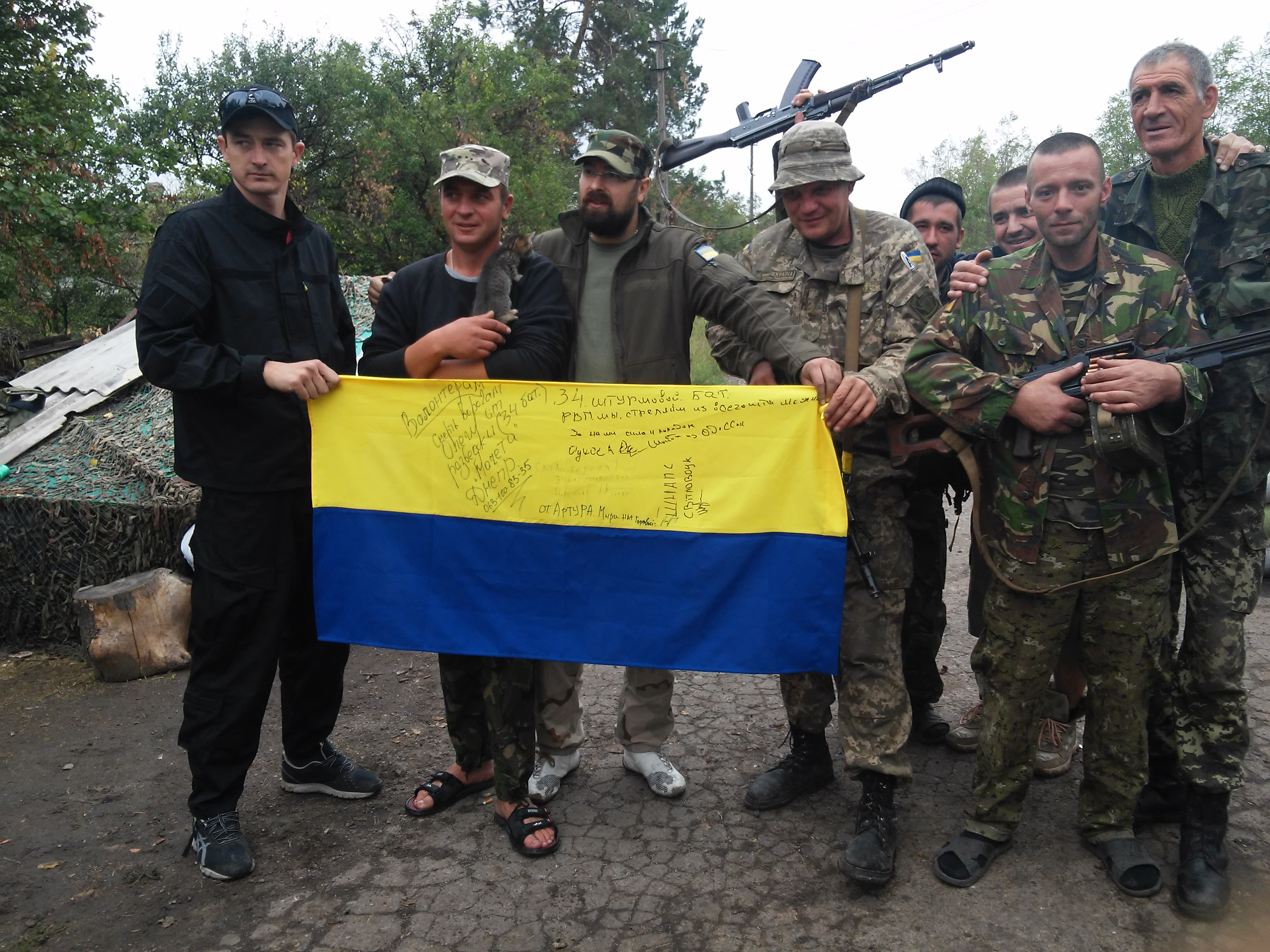 Активісти організації з військовими. Третій зліва - Тарас Герман.